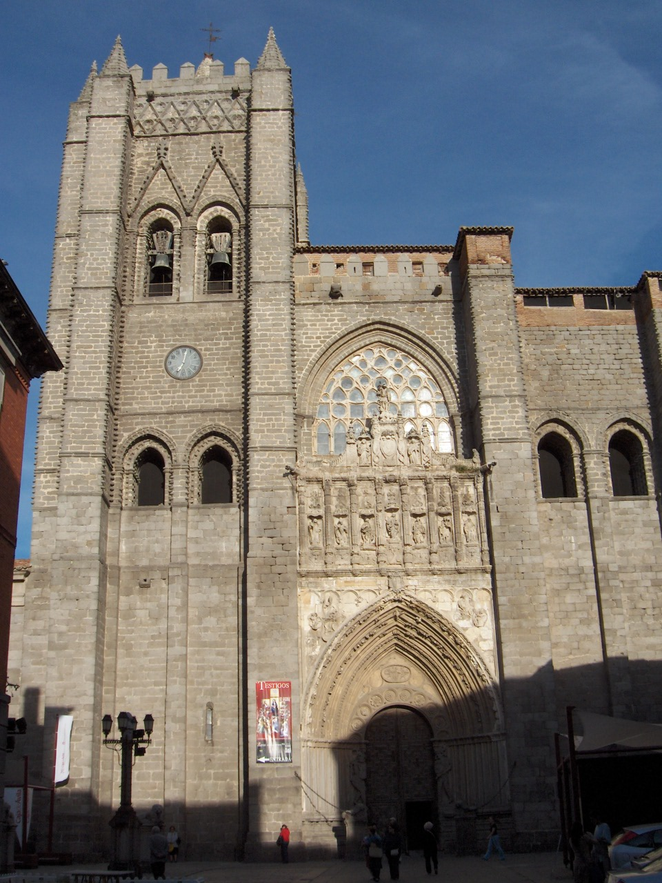 Fachada principal de la catedral de Ávila Foto tomada por Jorge González. Categoría:Religión (imagen)